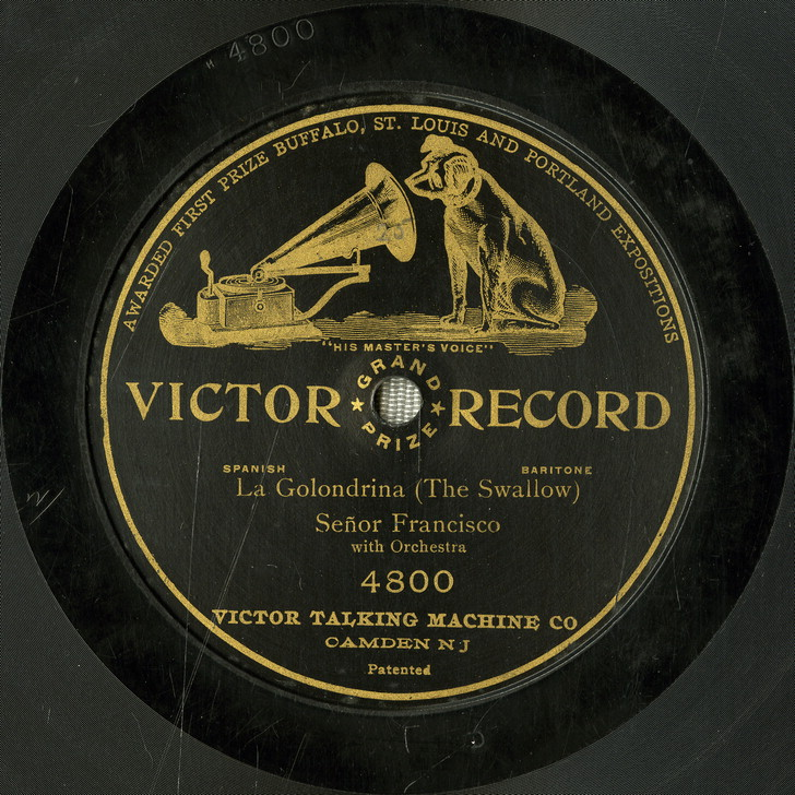 La Golondrina Victor Record